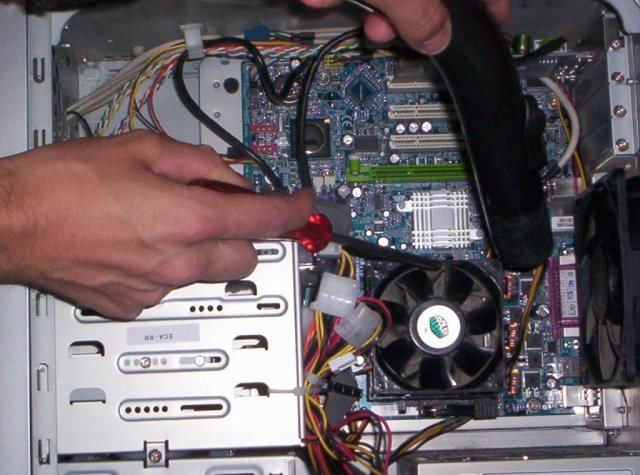 computer met handschroevendraaier en stofzuiger.